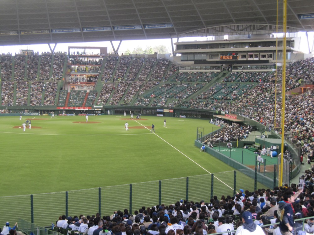 改修工事が完了した西武ドームの様子